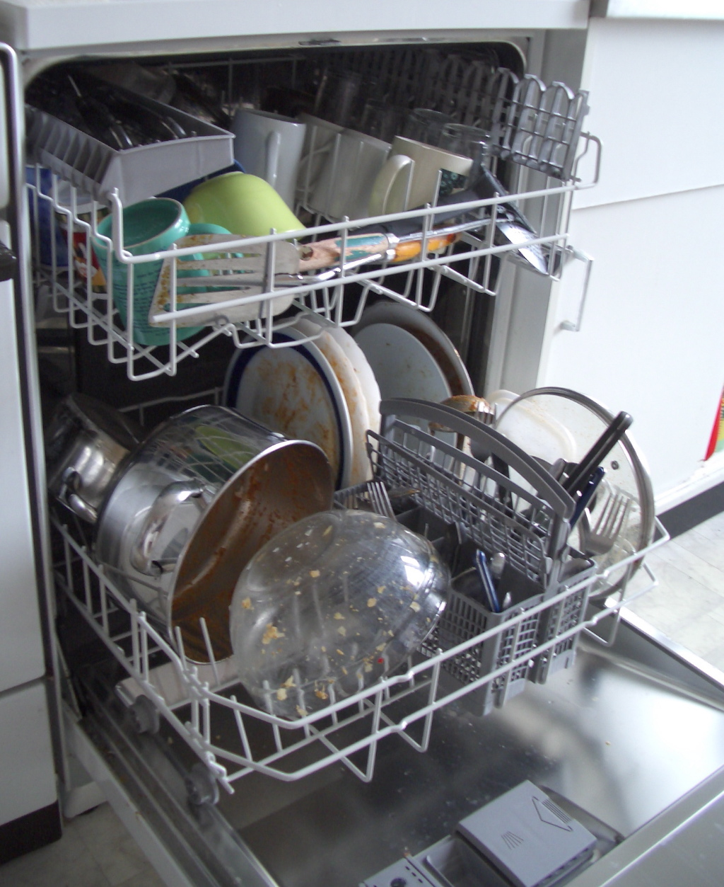 Eigene Fotografie Oktober 2004